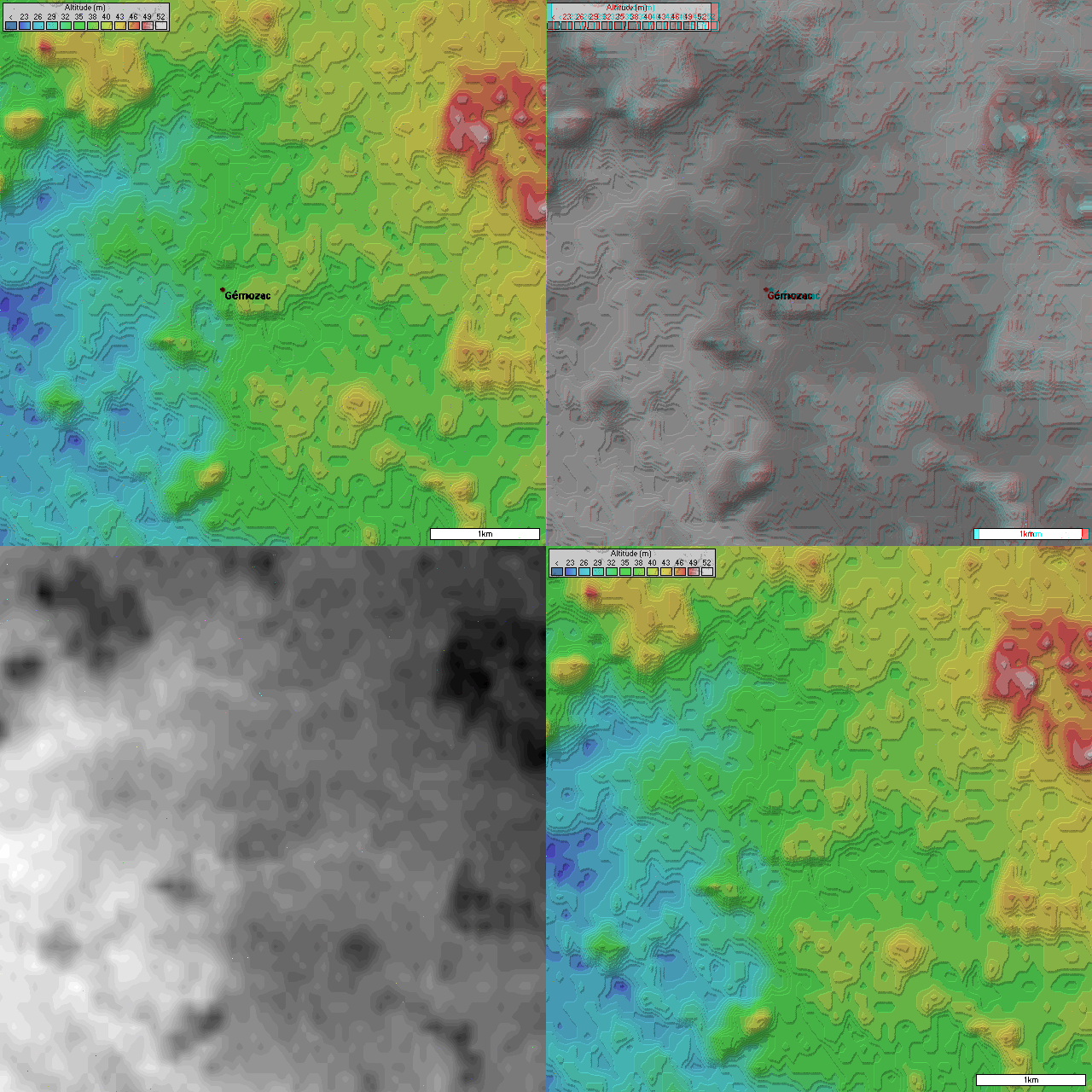 4 images topographique (5 km de coté) de Gémozac prisent par la mission SRTM. Image topographique + position des villes image topographique en relief + position des villes image topographique en niveau de gris (utile pour displacement map dans les logiciel 3D) Image topographique sans les villes Générée par le logiciel Radiomobile à partir des données domaine publique de la mission SRTM de la NASA.